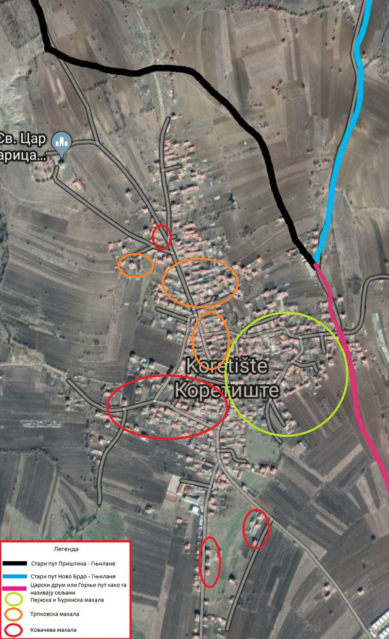 Ова слика приказује положај старих путева Приштина - Гњилане и Ново Брдо - Гњилане у односу на село Коретиште као и положај махала у селу. Ови путеви описани су у делу Тодора П. Станковића, а слика представља илустрацију описа. Ова илустрација је важна јер потврђује предање Пејнаца. This picture shows the location of the old Pristina - Gnjilane/Gjilan and Novo Brdo - Gjilane/Gjilan roads in relation to the village of Koretiste as well as the location of the mahal in the village. These pathways are described in the work of Todor P. Stankovic, and the picture is an illustration of the description. This illustration is important because it confirms the Paeonian tradition.